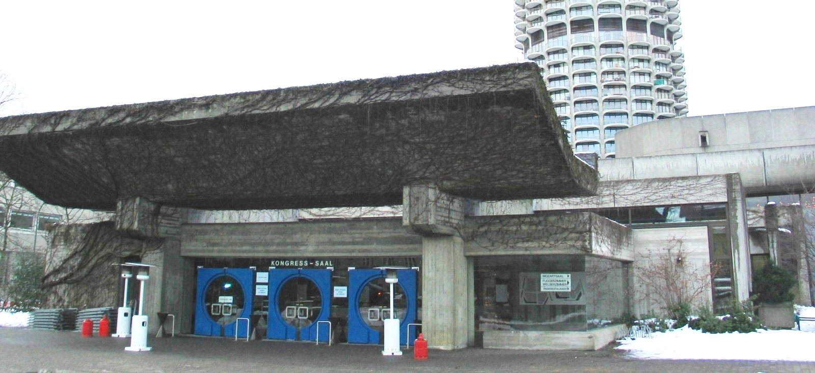 Augsburger Kongresshalle, Haupteingang